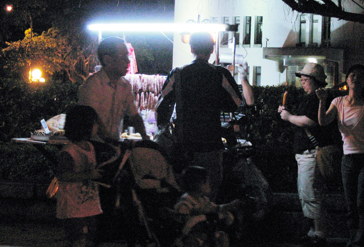 民主香腸 攝於2004年9月25日，凱達格蘭大道「和平演場會」旁，中華民國外交部前的「民主香腸攤」。 Richy 04:39 2004年12月3日 (UTC)